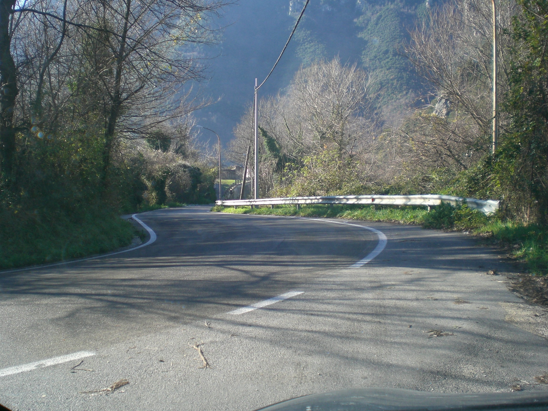 Tratto della strada provinciale 31 Campagna-Acerno